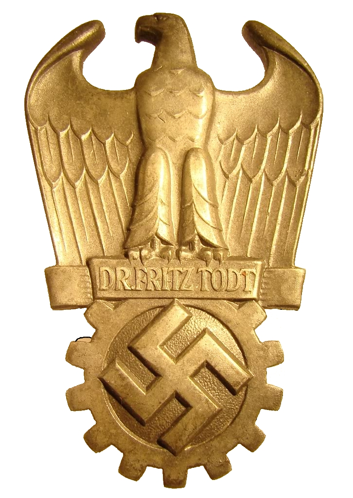 Fritz Todt Badge